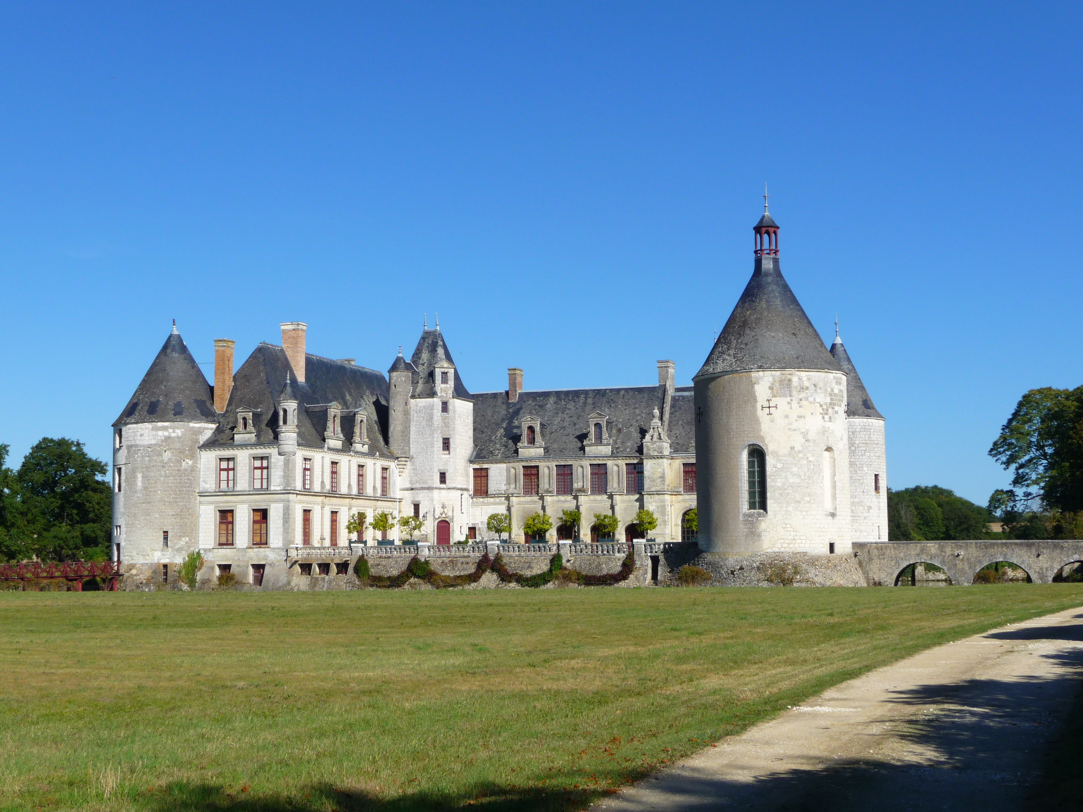 Château vue de l'est